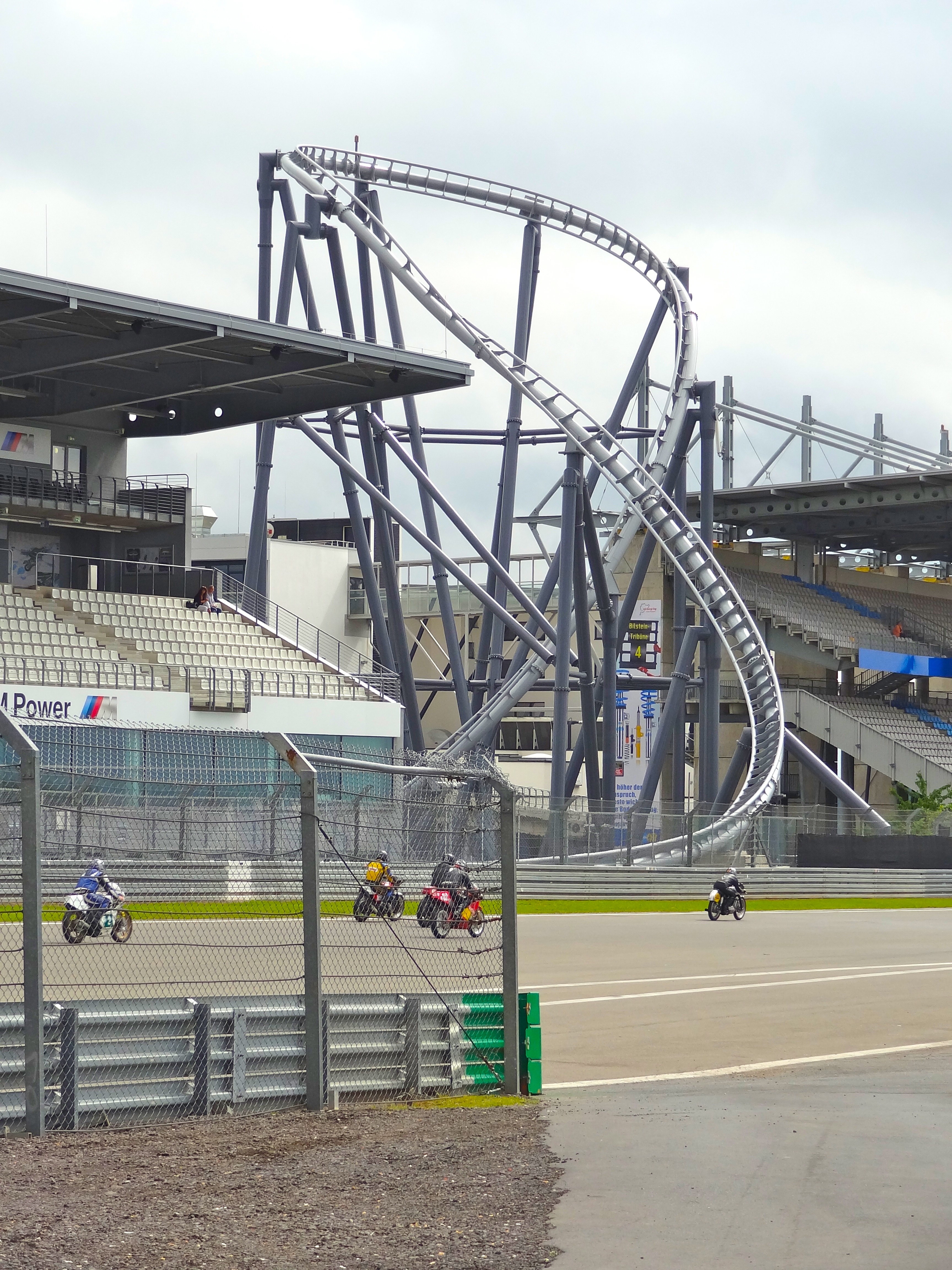 Nürbirgring ring°racer